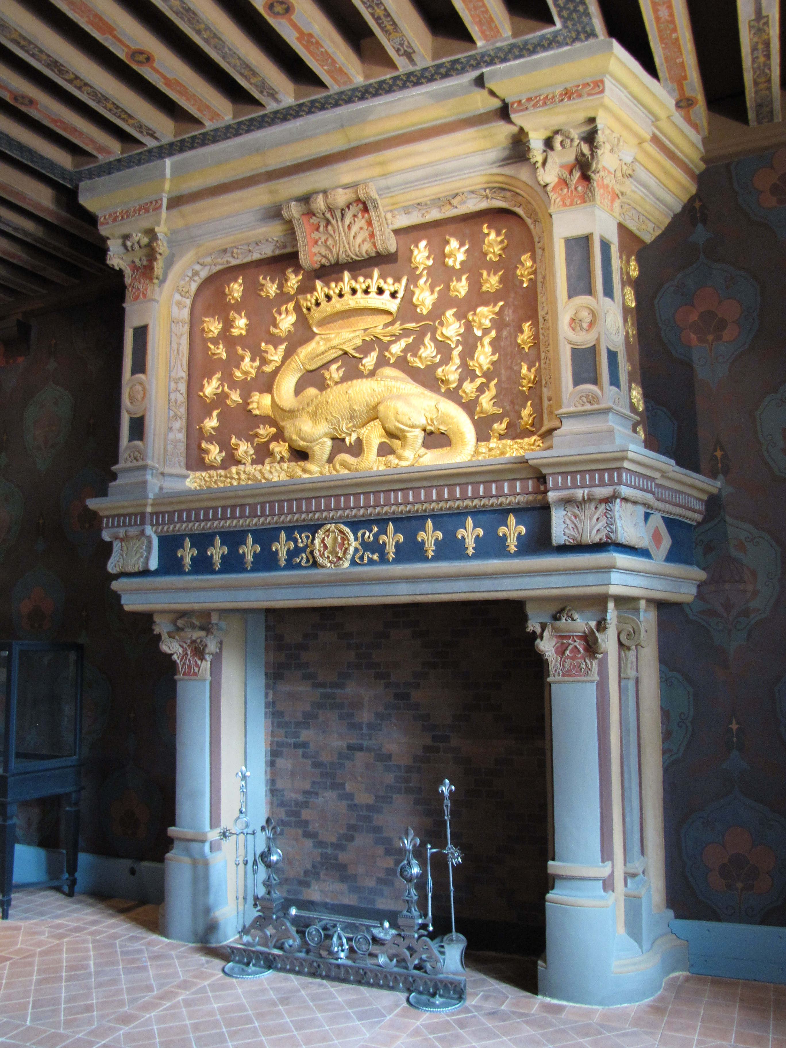 Kamin und Feuerbock, Schloss Blois, Loir-et-Cher, Centre, Frankreich.